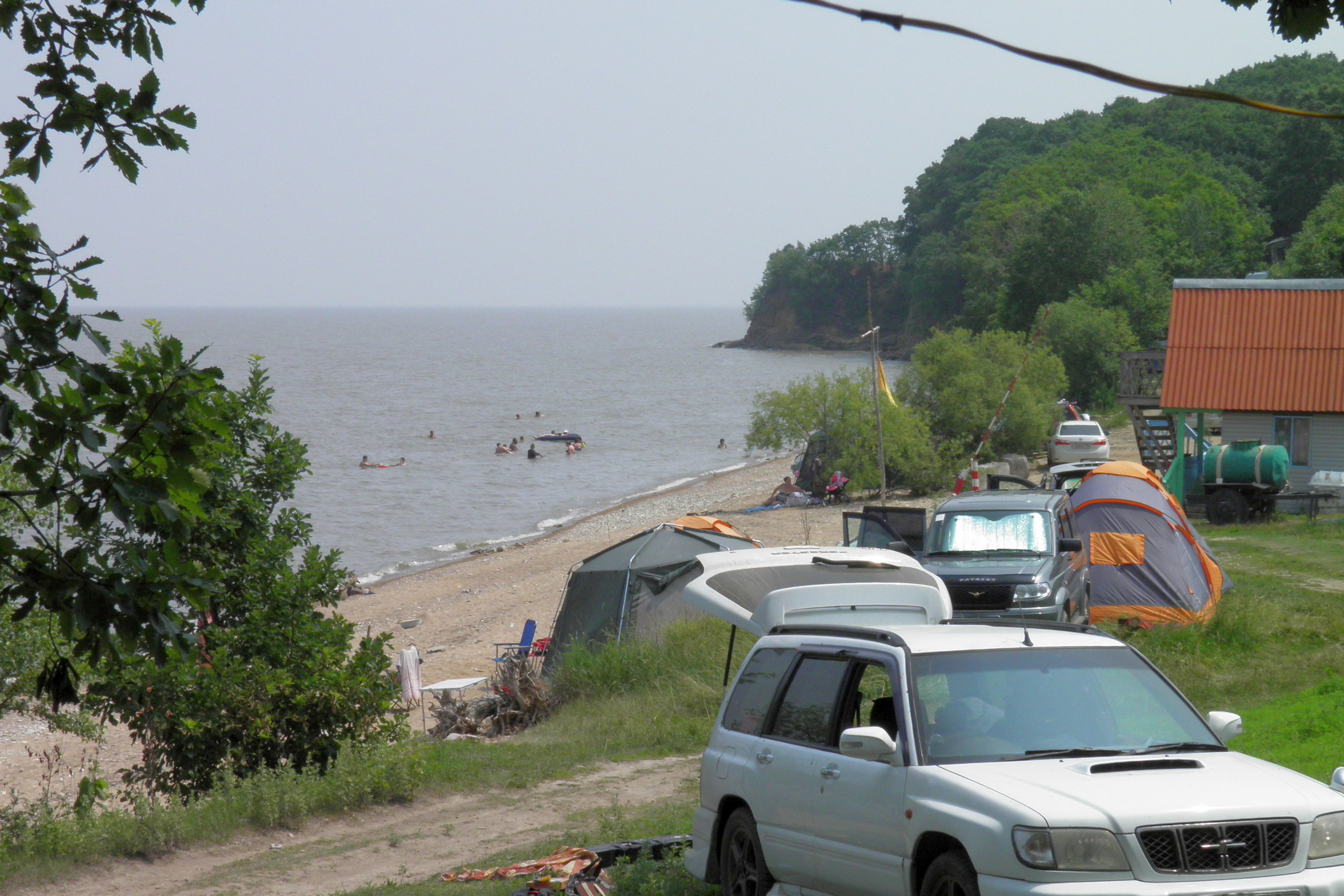 База отдыха в окрестностях села Камень-Рыболов. Озеро Ханка